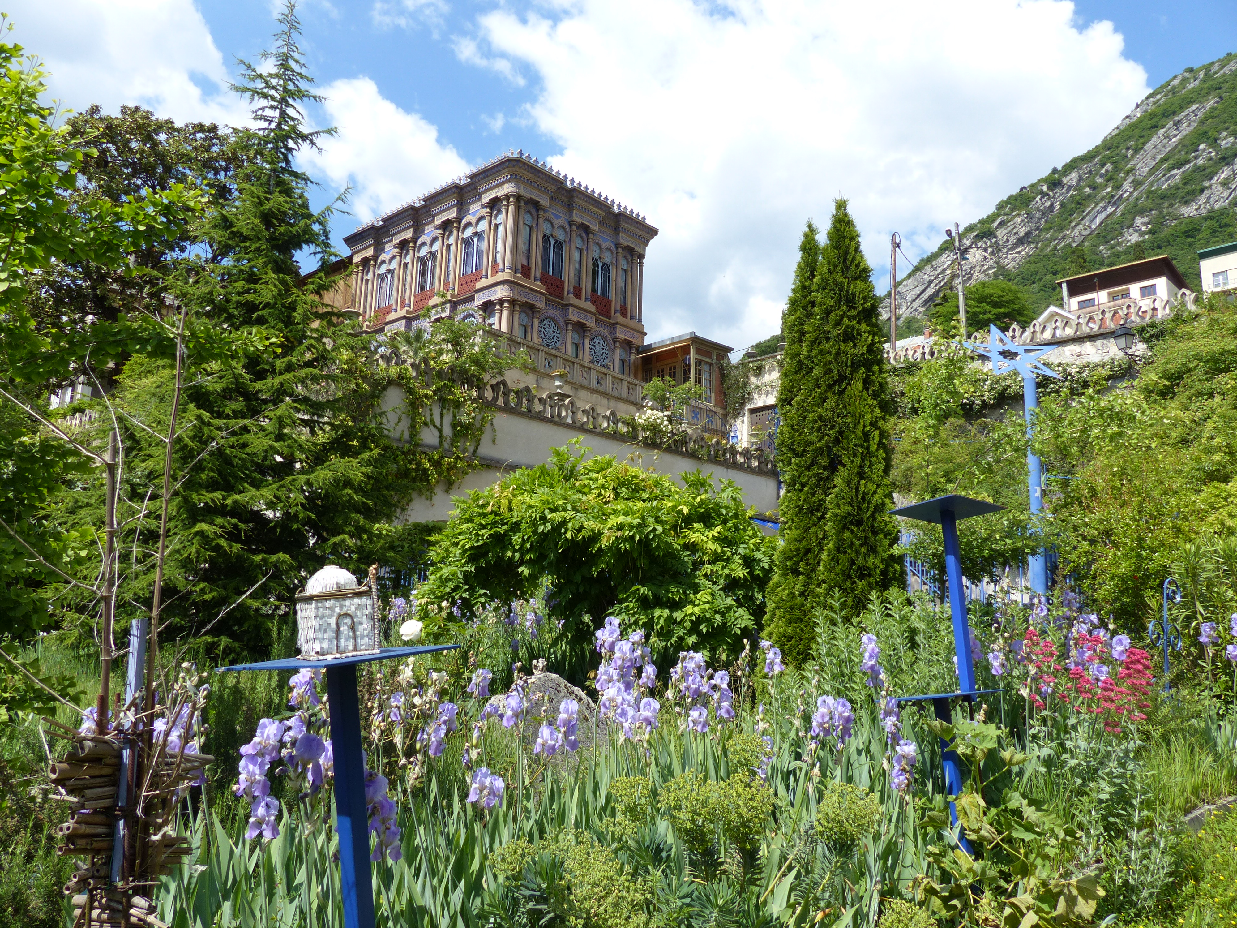 La Casamaures, Saint-Martin-le-Vinoux, Isère, France. Cette photo fait partie d'une série de 30 photos. Don à Wikimédia par Sylvie Jeanson, à l'occasion des 30 ans de l'association "La Casamaures d'hier et d'aujourd'hui", dans le cadre des Journées contributives à la Casamaures du 4 et 5 avril 2015. Photo autorisée par l'association et par la proprietaire Christiane Guichard. La Casamaures et ses jardins.